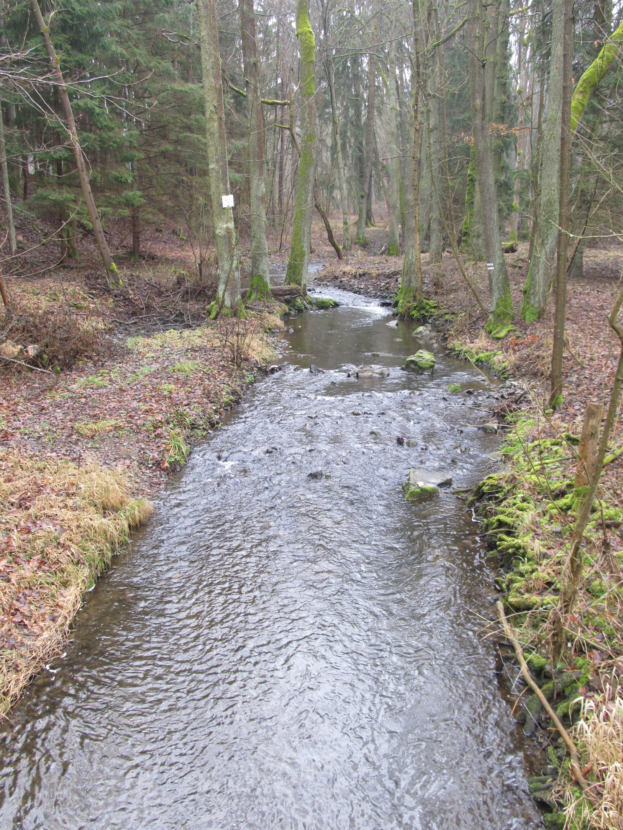 Kornatický potok pod Lopatou